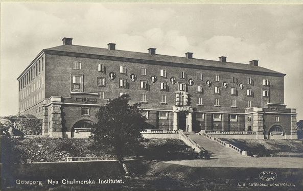 Chalmers tekniska institut, Johanneberg. Origobyggnadens fasad åt öster. Invigt 1926. Arkitekter Arvid Fuhre, Conny Nyquist, Karl Samuelsson och Hugo Jahnke